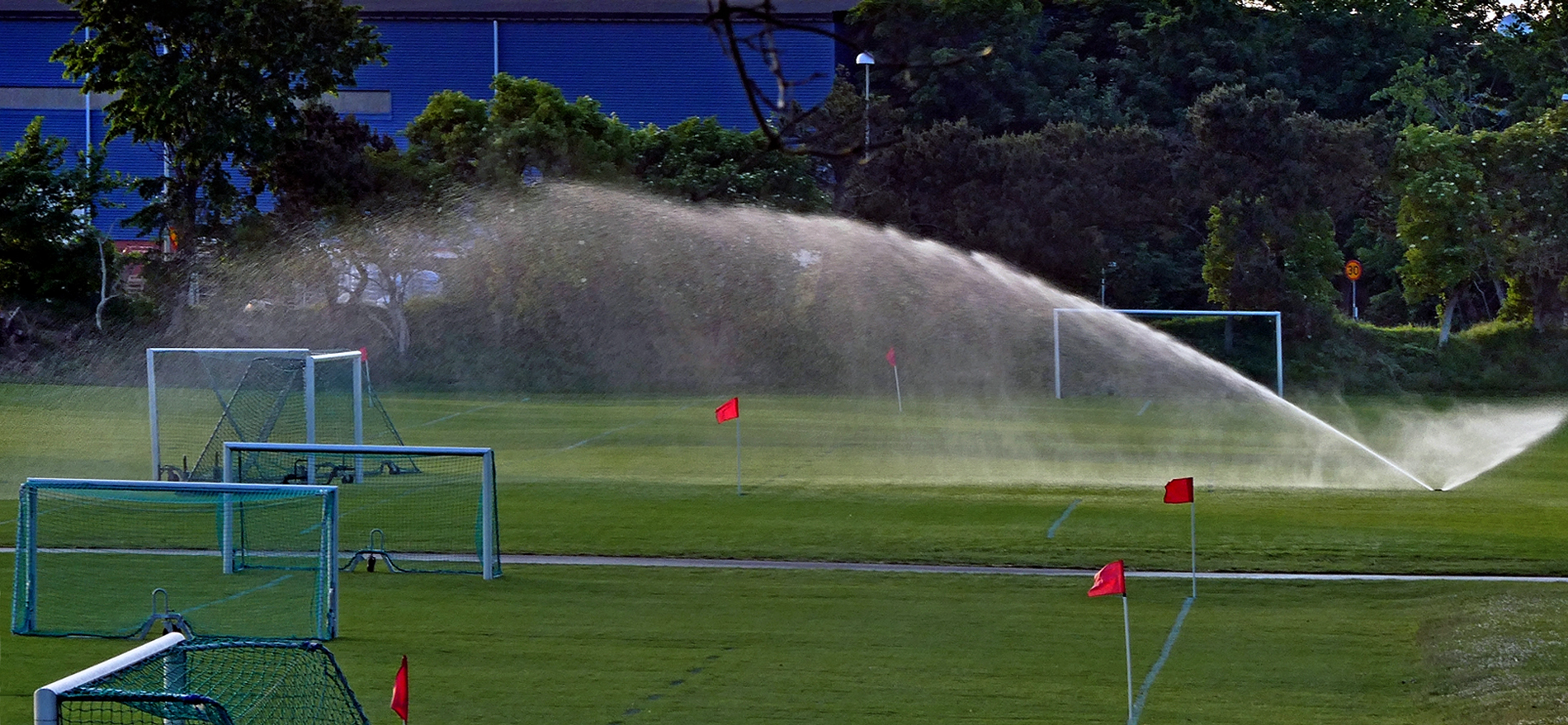 Konstbevattning av en fotbollsplan i Ystad 13 juni 2020.